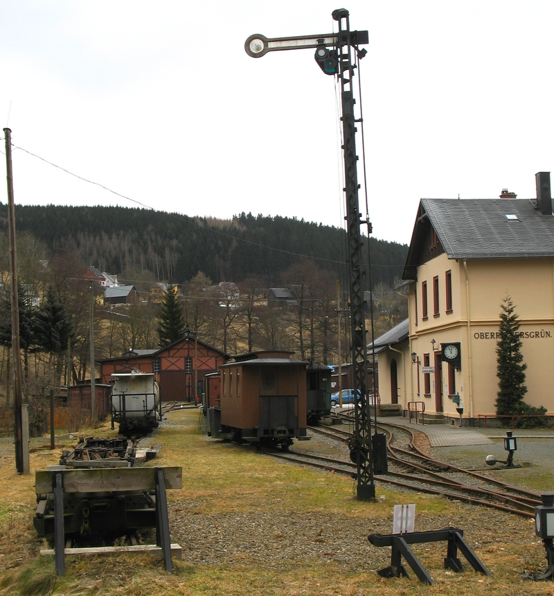 Bahnhof Rittersgrün / Rittersgrün Station